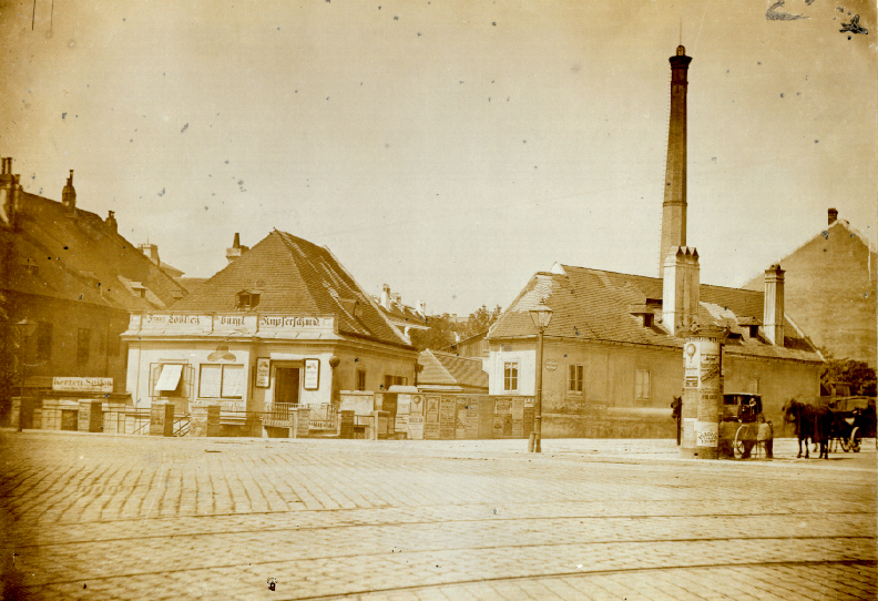 Kupferschmiede Löblich, Wien, Himmelpfortgrund 1, schräg gegenüber dem Geburthaus des Komponisten Franz Schubert, dem Schulhaus am Himmelpfortgrund gelegen, um 1870